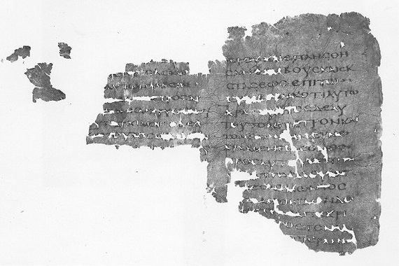 Codex 057 (Gregory-Aland), manuscript of the New Testament